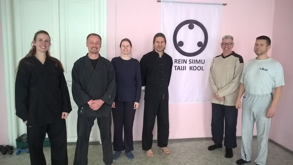 Rein Siimu Taiji Kooli Tallinna grupi taiji õpetajad ja õpilased 2018. aastal koos külas oleva taiji õpetajaga Soomest (vasakult esimene)